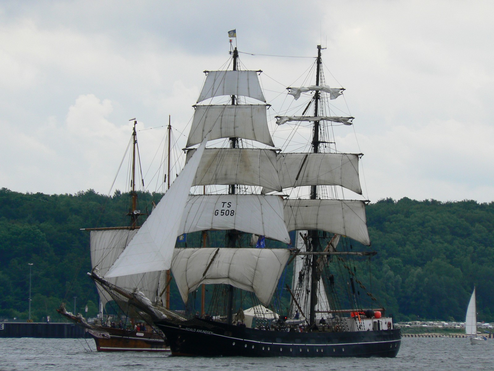 Segelschiff (Brigg) Roald Amundsen auf der Kieler Woche 2007.